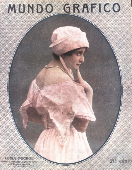 Fotografía de la actriz española Luisa Puchol publicada en la portada de la revista Mundo Gráfico.